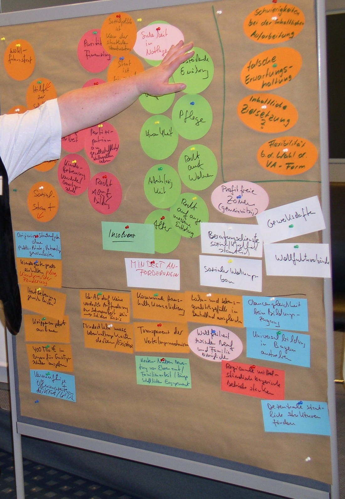 Pinnwand mit Metaplankarten und einer Hand als Bericht aus einer Arbeitsgruppe